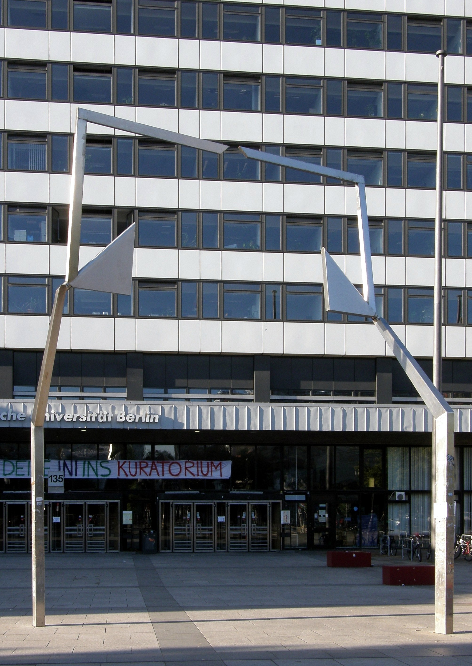 Reinhard Haverkamp - Flügeltor. 1992. Vor dem Hauptgebäude der TU Berlin in Berlin-Charlottenburg.